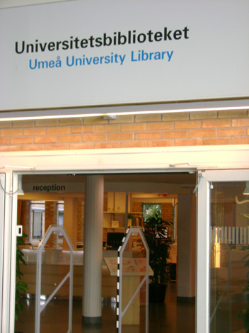 Entré till UB från Lindellhallen